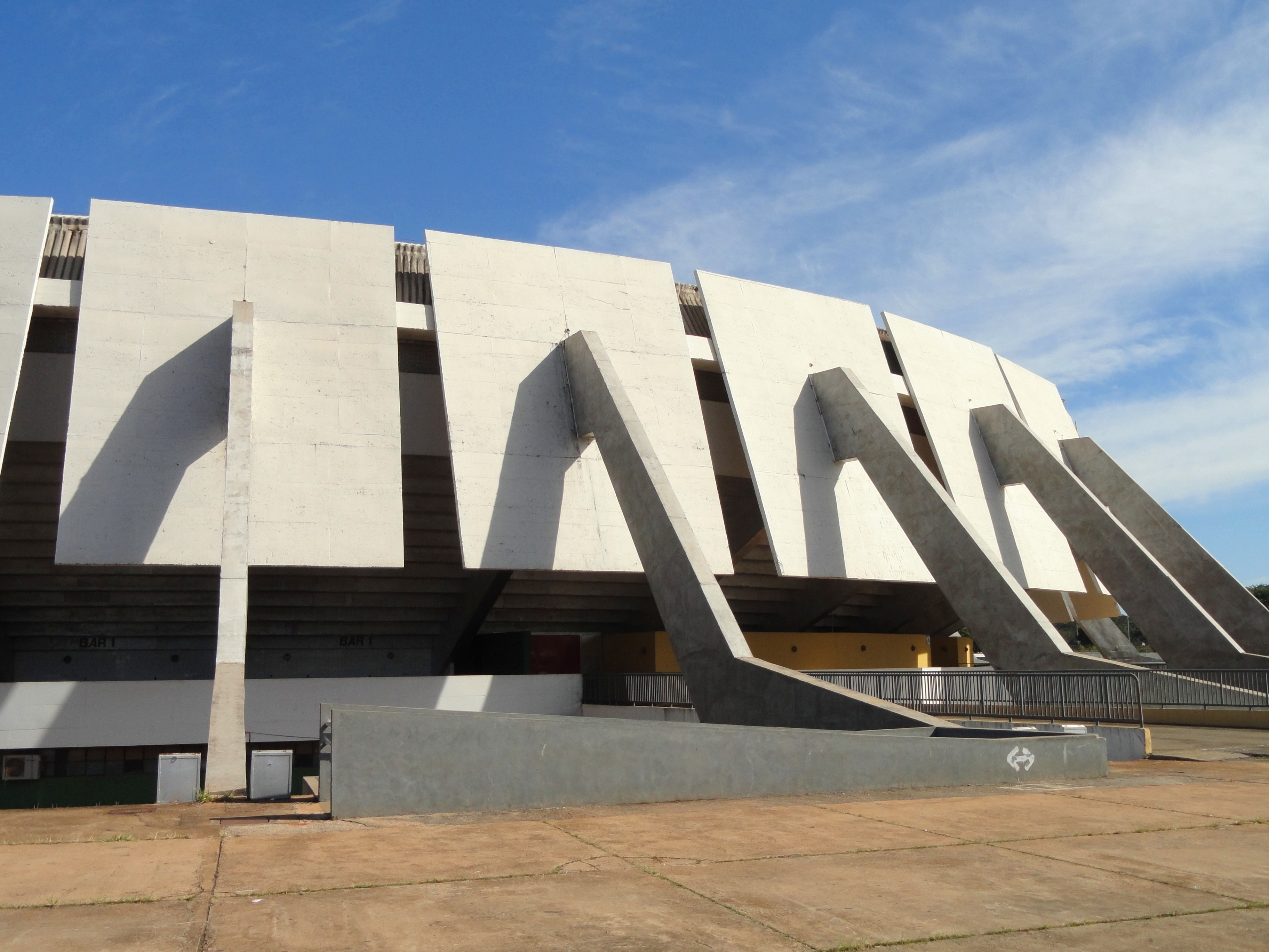 Ginásio Nilson Nelson, Brasília, Brazil.